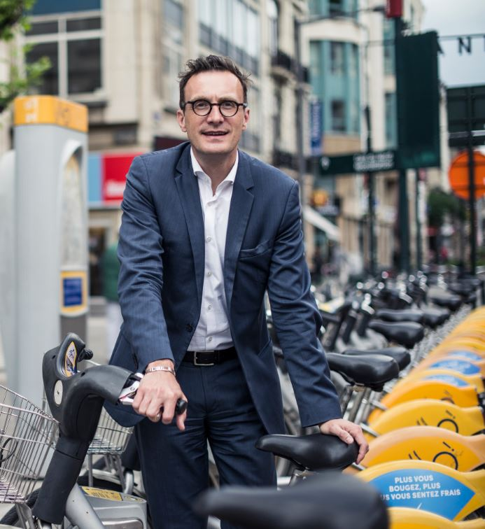 Pascal Smet, Ministre de la Mobilité et des Travaux Publics en Région de Bruxelles-Capitale